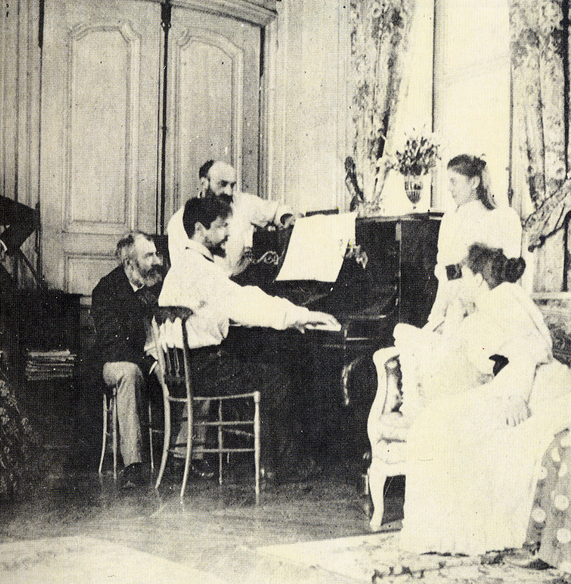 Claude Debussy au piano l'été 1893 dans la maison de Luzancy (chez son ami Ernest Chausson).